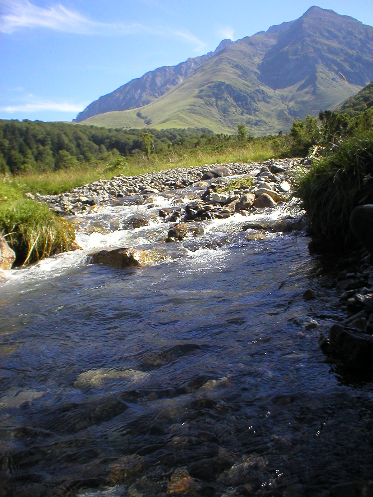 Photo prise par moi-même en 2005 dans les Pyrénées en France.